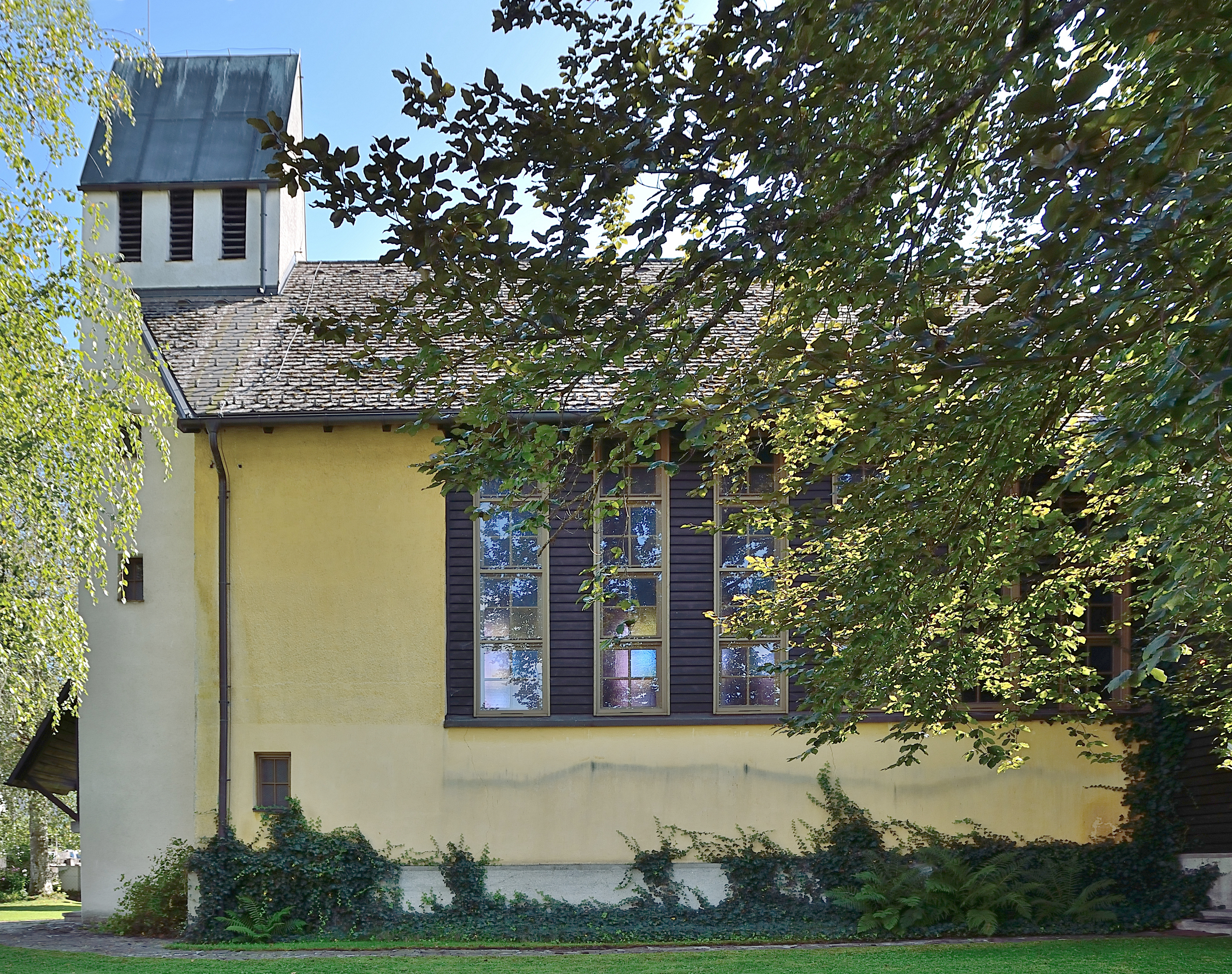 Evang. Pfarrkirche A.B. Admont, Steiermark. Nordseite.